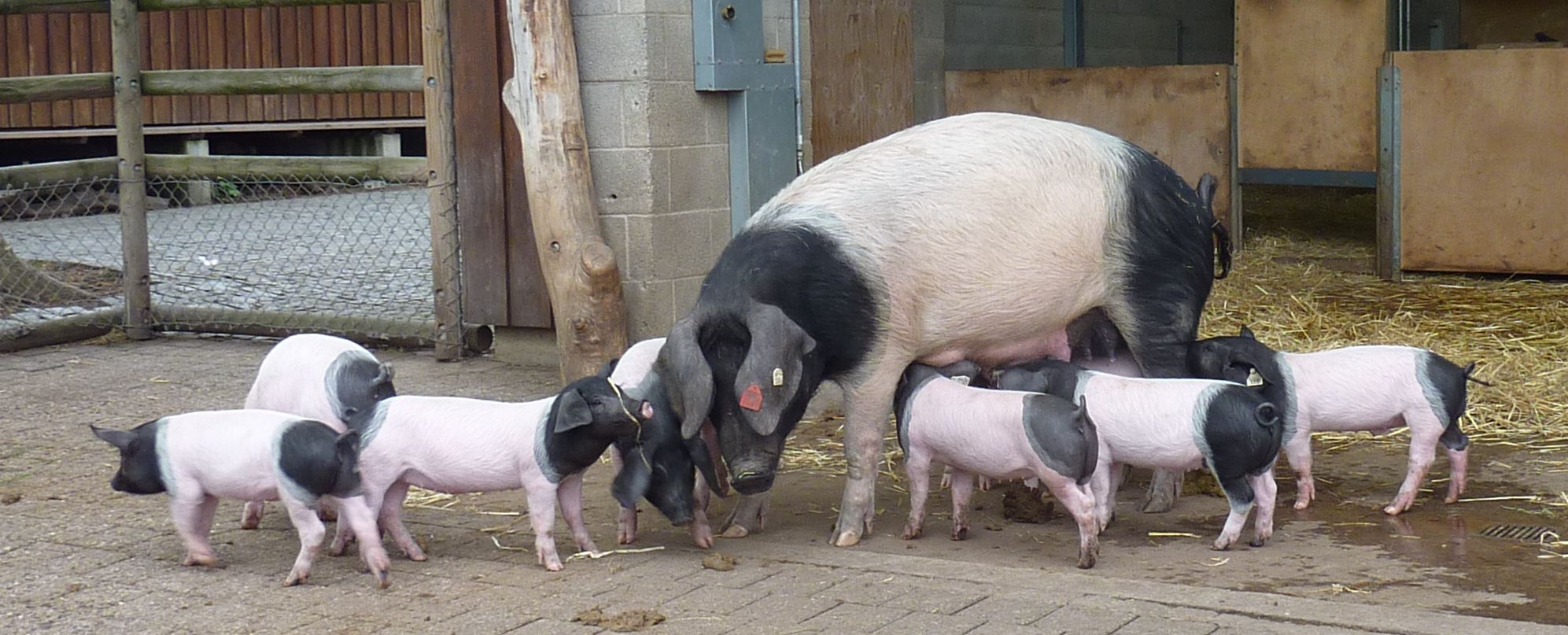 Schwäbisch-Hällisches Schwein in der Wilhelma